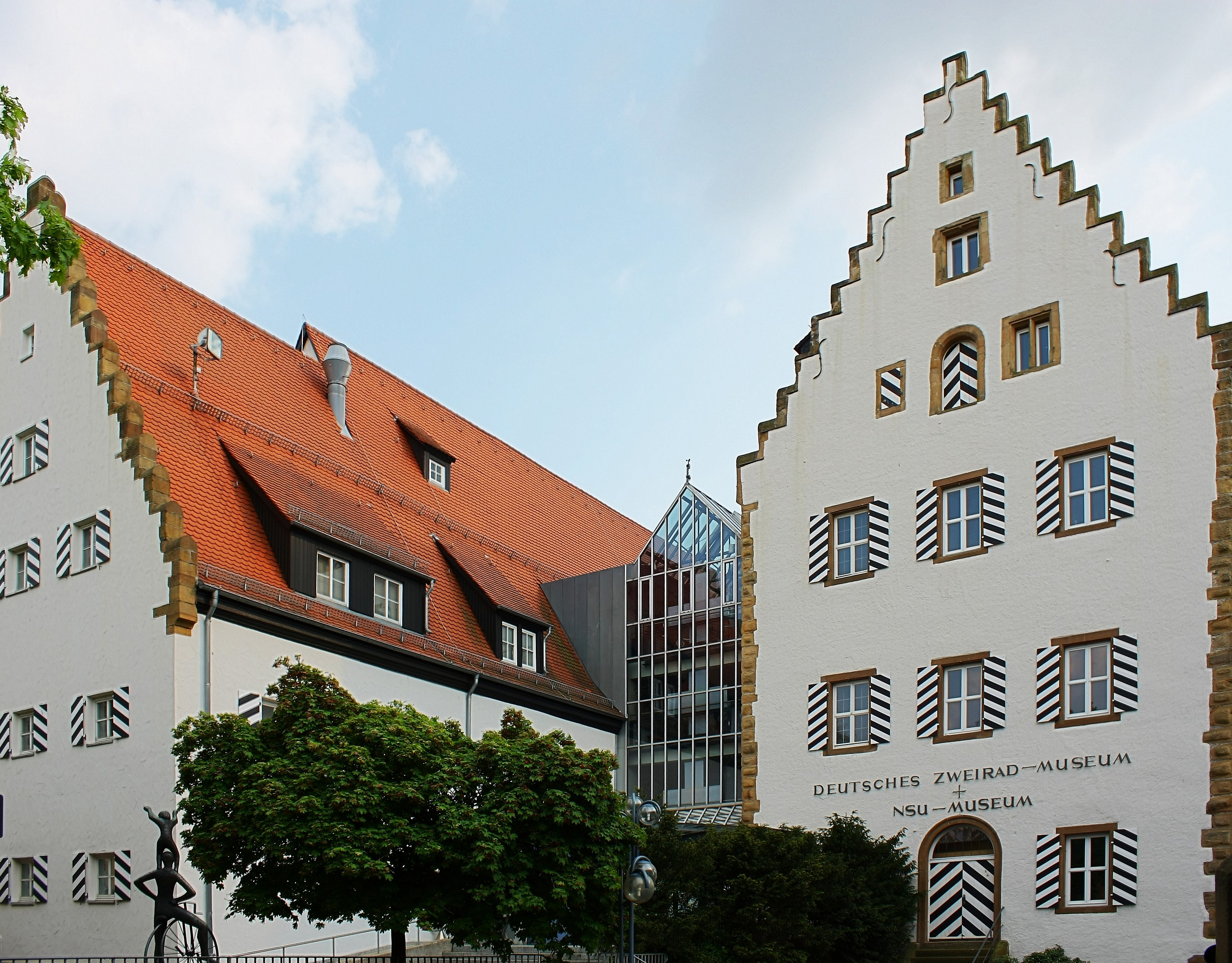 Deutsches Zweirad- und NSU-Museum - Innenhof, Neckarsulm, Deutschland